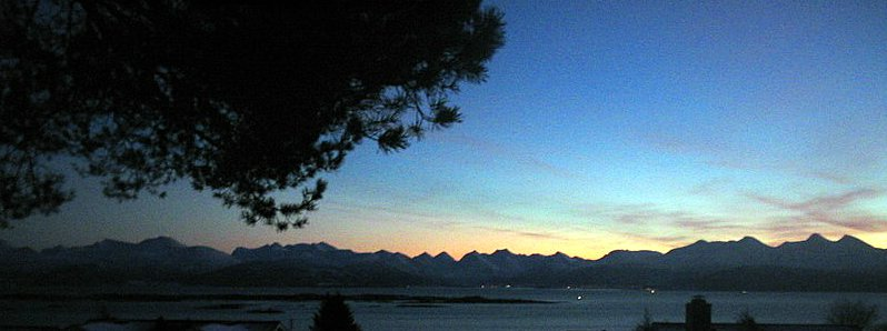 December night in Molde